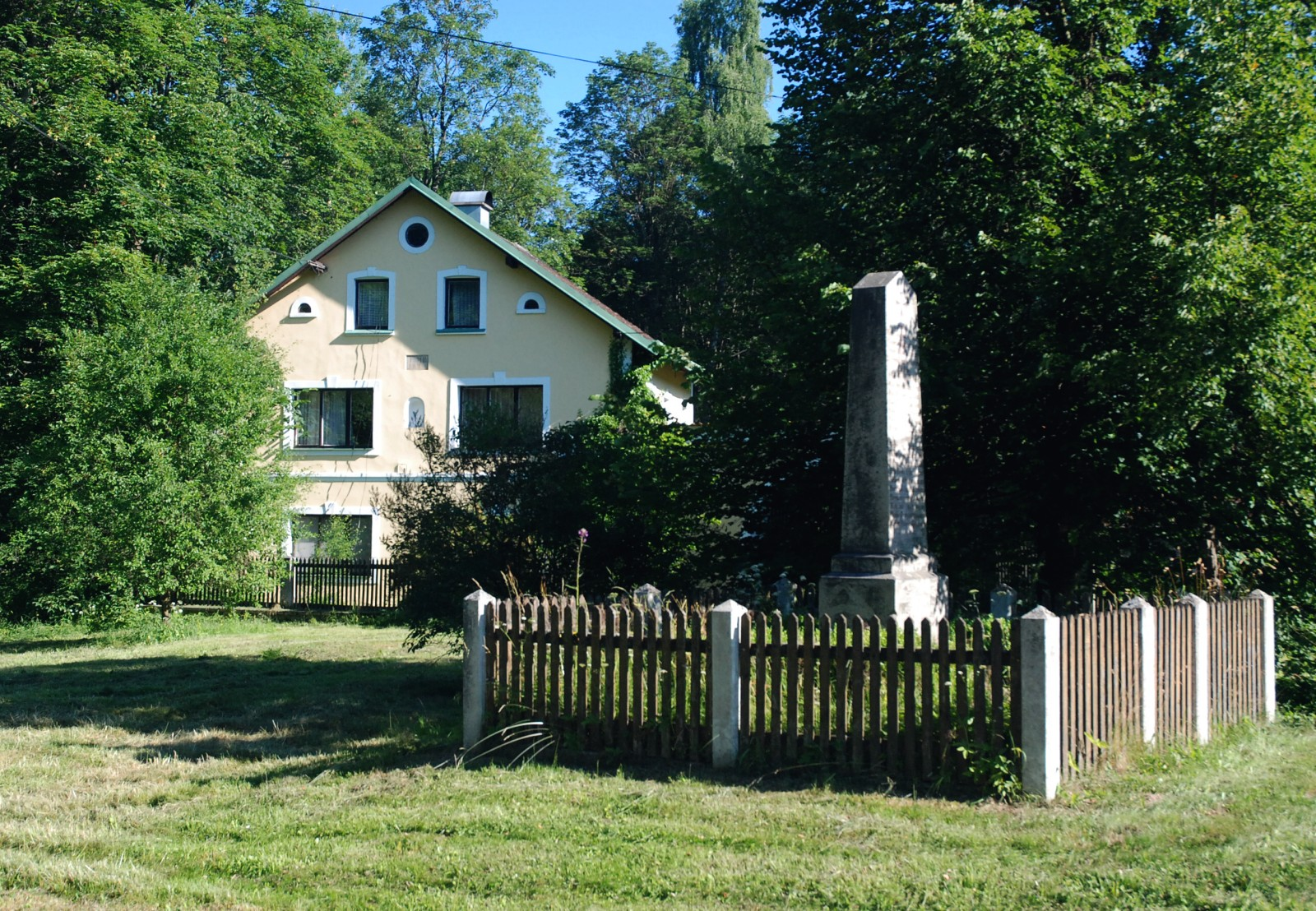 Písařova Vesce - pomník obětem 1. světové války